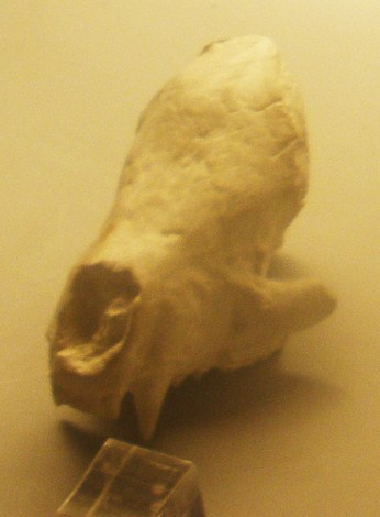 Fossil of Meles thorali, an extinct mammal- Took the picture at Museo di Paleontologia di Firenze